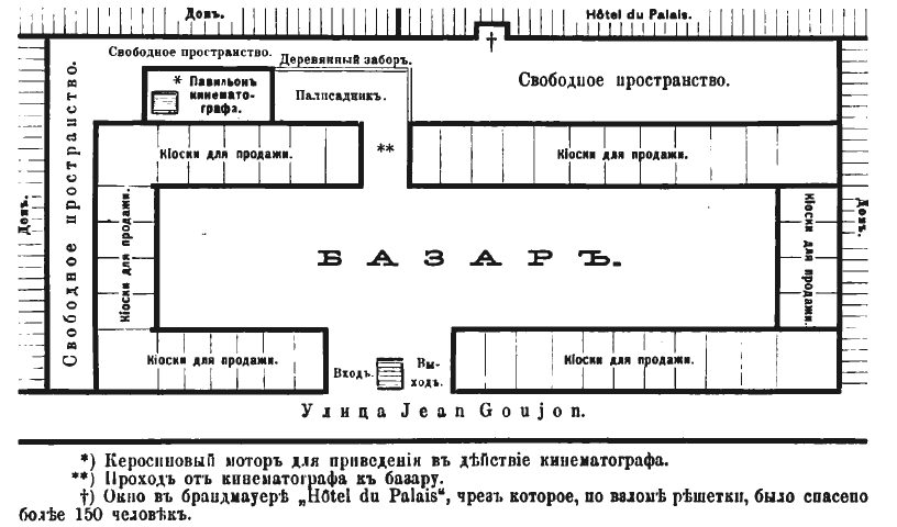 Схема Благотворительного базара из Журнала "Нива"